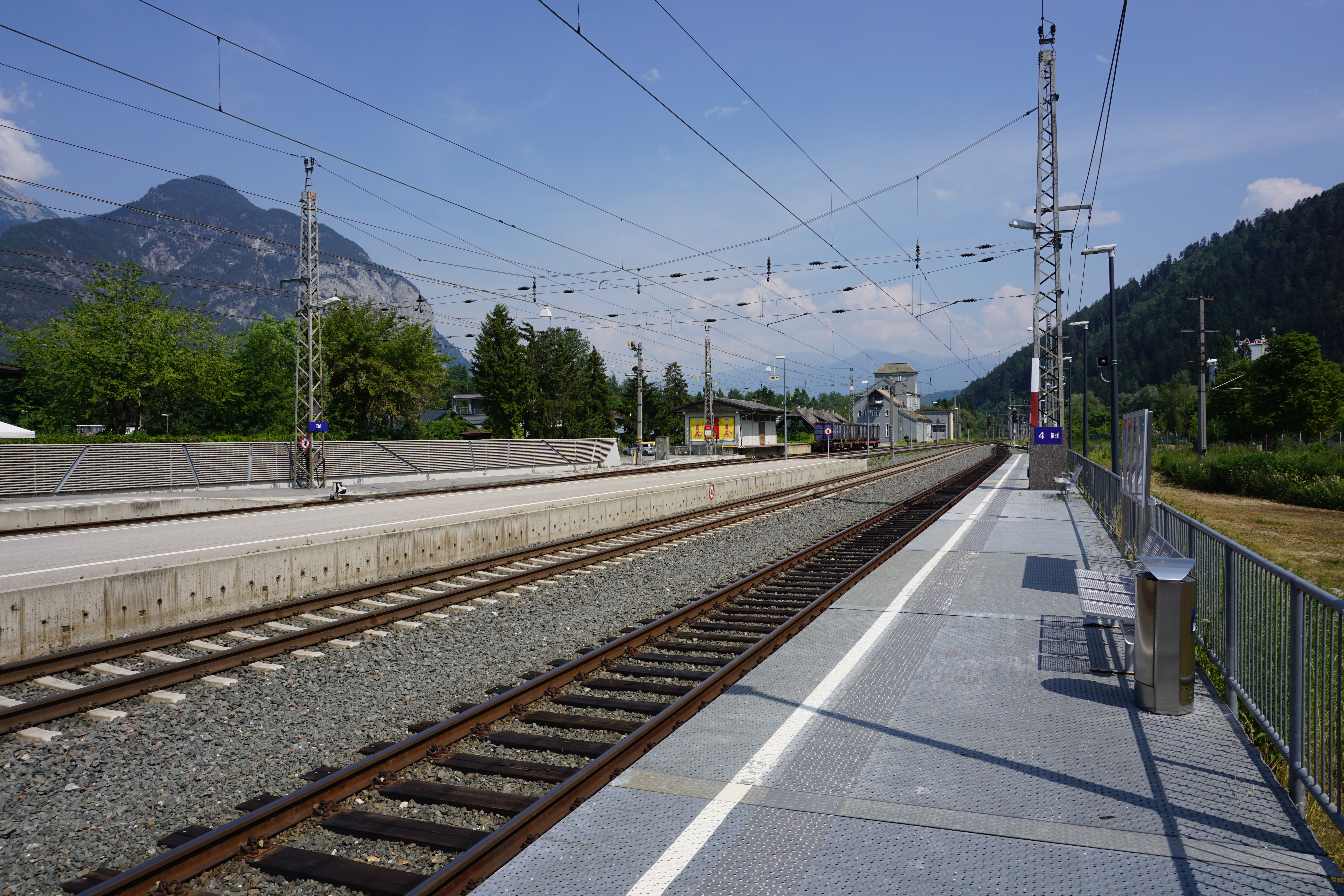 Bahnhof Zirl: Bahnsteig 4 mit Blick nach Osten